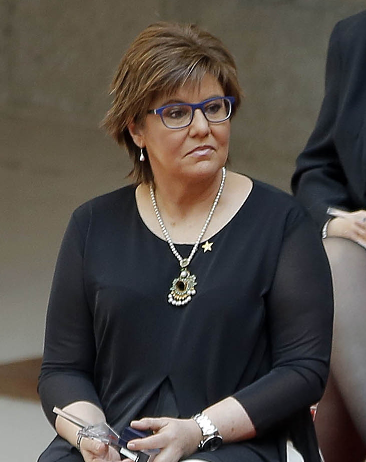 Conmemoración Día de la Mujer CAM, premiadas